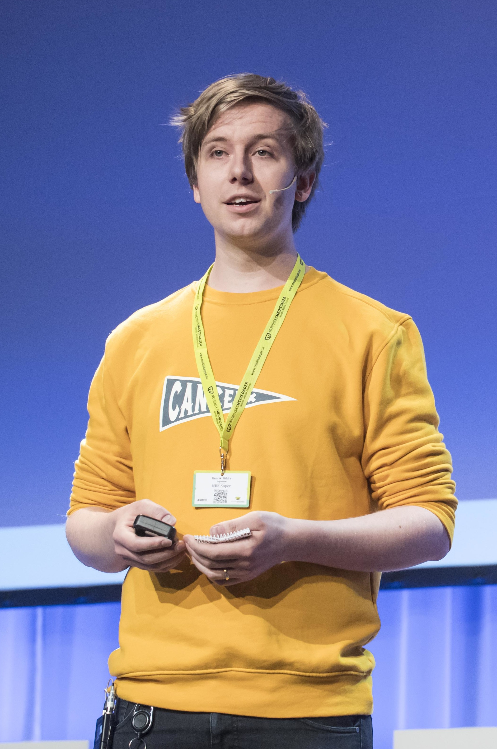 Norwegian youtuber and tv-host Henrik Hildre in 2017. YouTubestjernenes medieverden med Herman Dahl, Markus SannesModerator Jonas Lihaug Fredriksen og Henrik Hildre